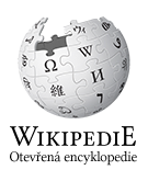 Wikipedia logo 2.0 (cs)